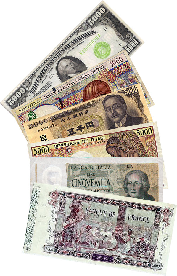 plusieurs billets de 5000, de différentes monnaies : franc, yen, lire, dollar